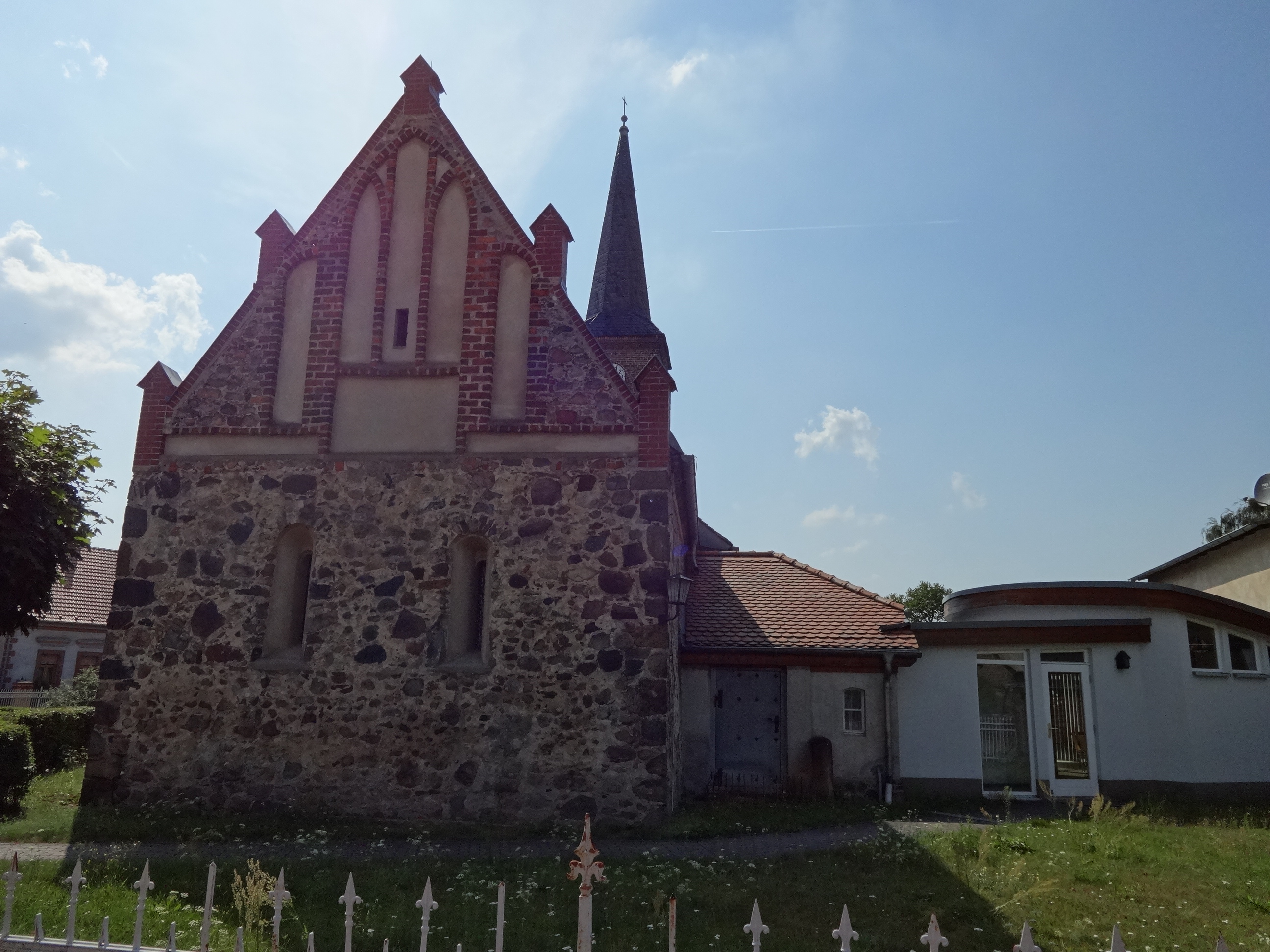 Dorfkirche in Hennickendorf, ein Ortsteil von Rüdersdorf bei Berlin. Errichtet vermutlich im 14. oder 15. Jahrhundert vermutlich als Wehrkirche. 1863 erheblich umgebaut.